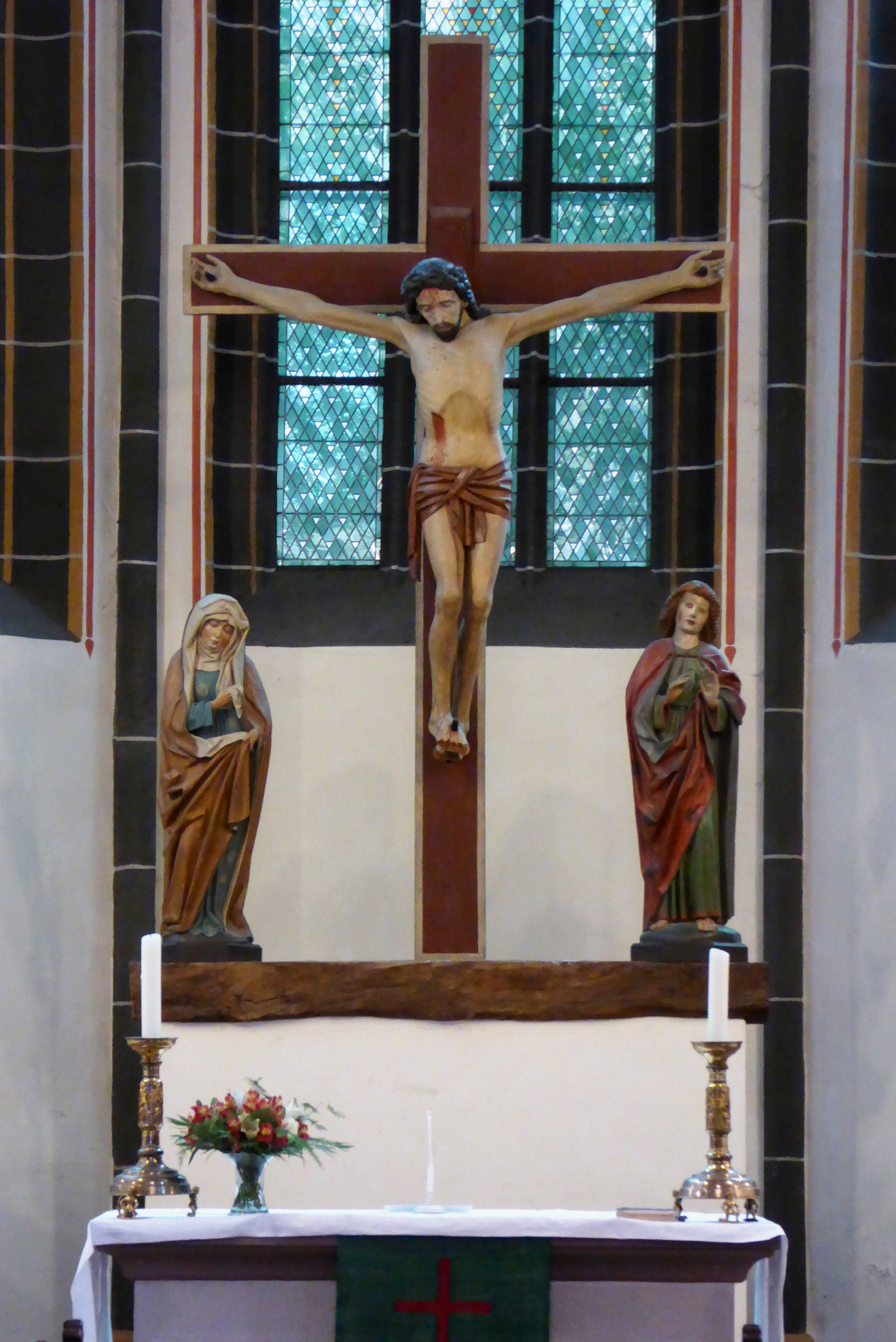 Spätgotische Kreuzigungsgruppe über dem Altar der St.-Nikolai-Kirche in Göttingen, Niedersachsen. Ursprünglichaus dem Dom zu Bardowick St. Peter und Paul, 1988 nach St. Nikolai gebracht